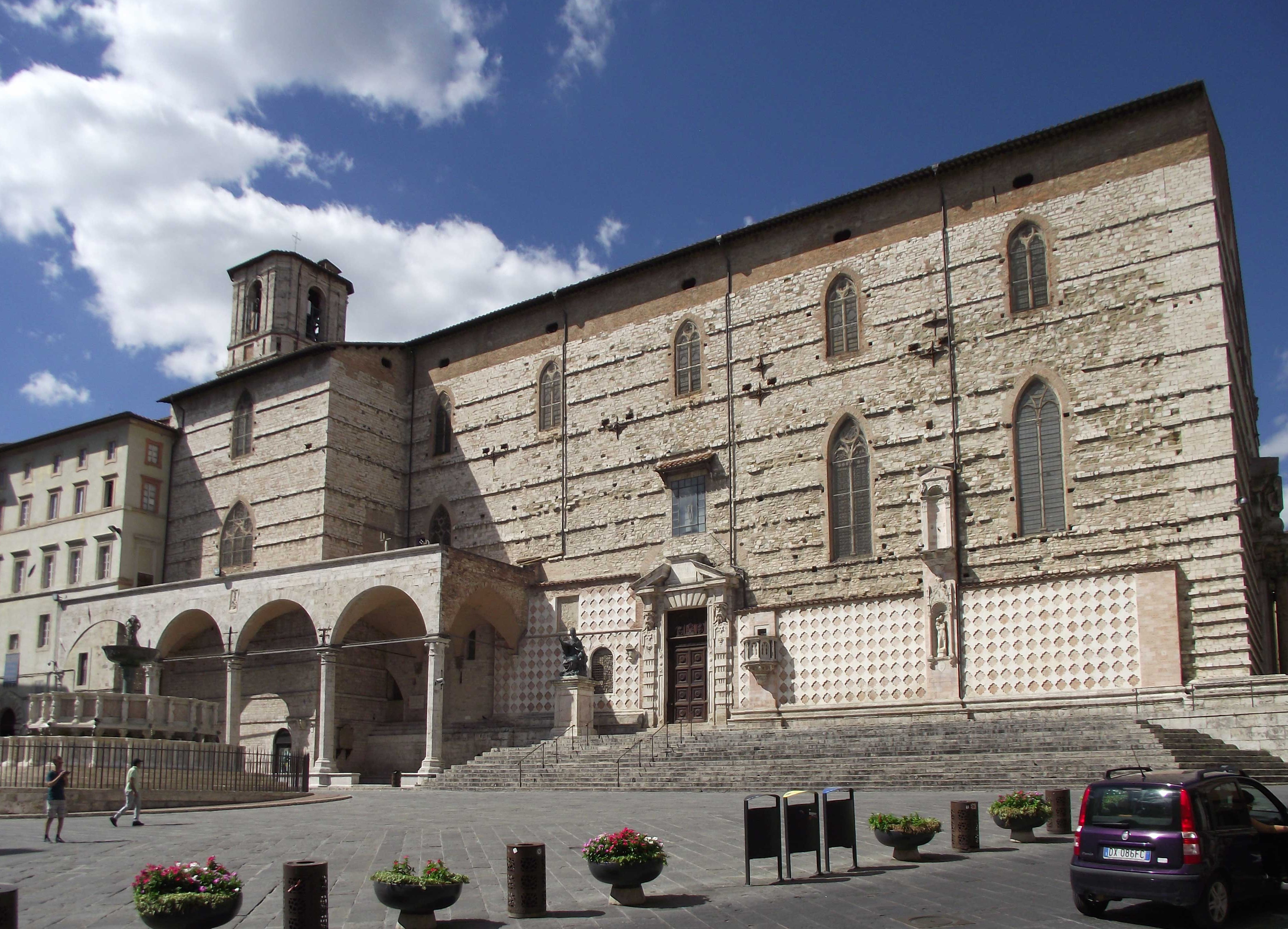 Perugia, Duomo di San lorenzo